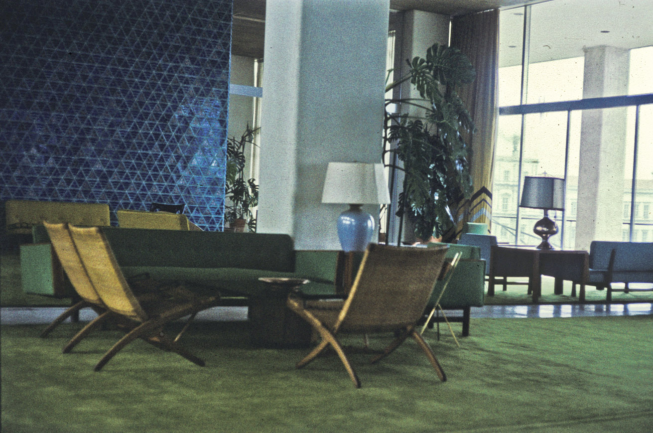 Hilton, Istanbul